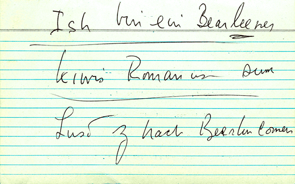 Kennedys Notizen zu seiner Berlin-Rede 1963Das Original befindet sich im Kennedy-Museum in Berlin.